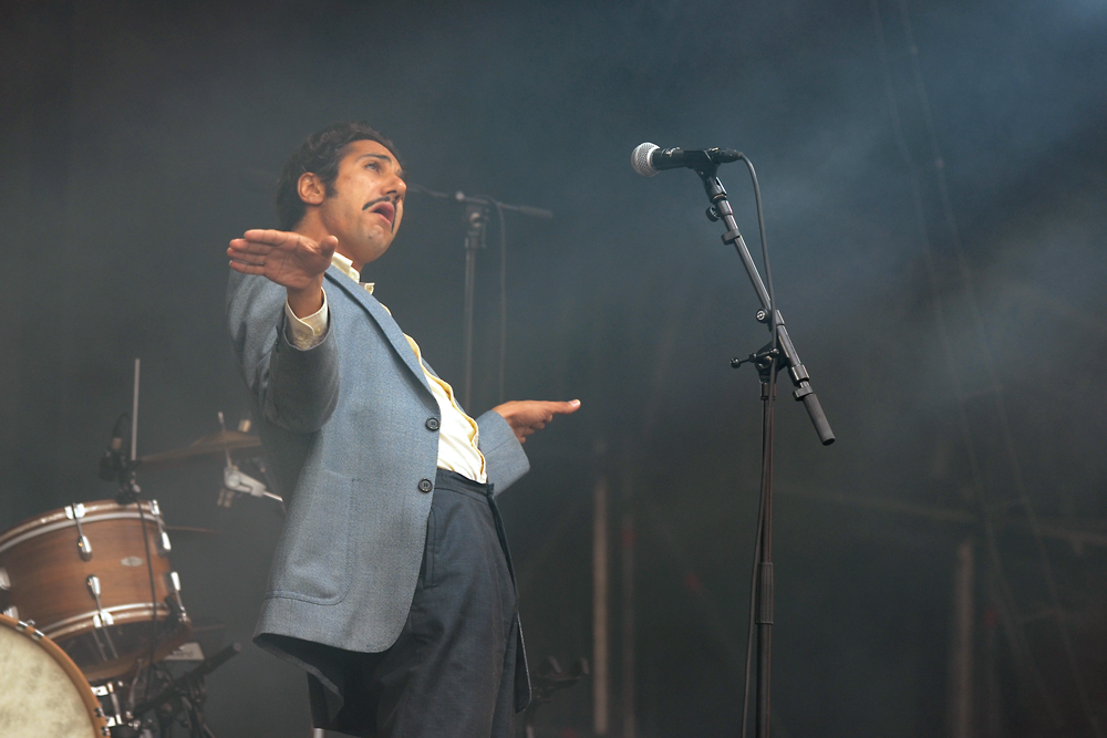 Arthur Teboul de Feu! Chatterton plane au festival Beauregard en 2016